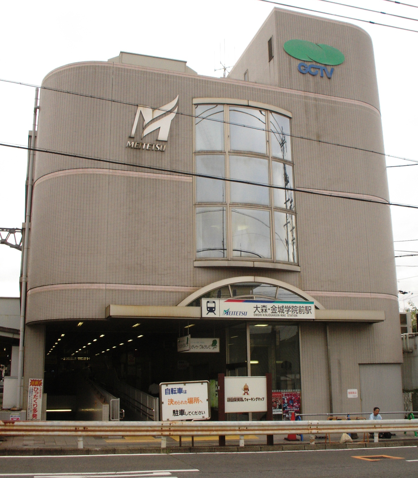 大森・金城学園前駅